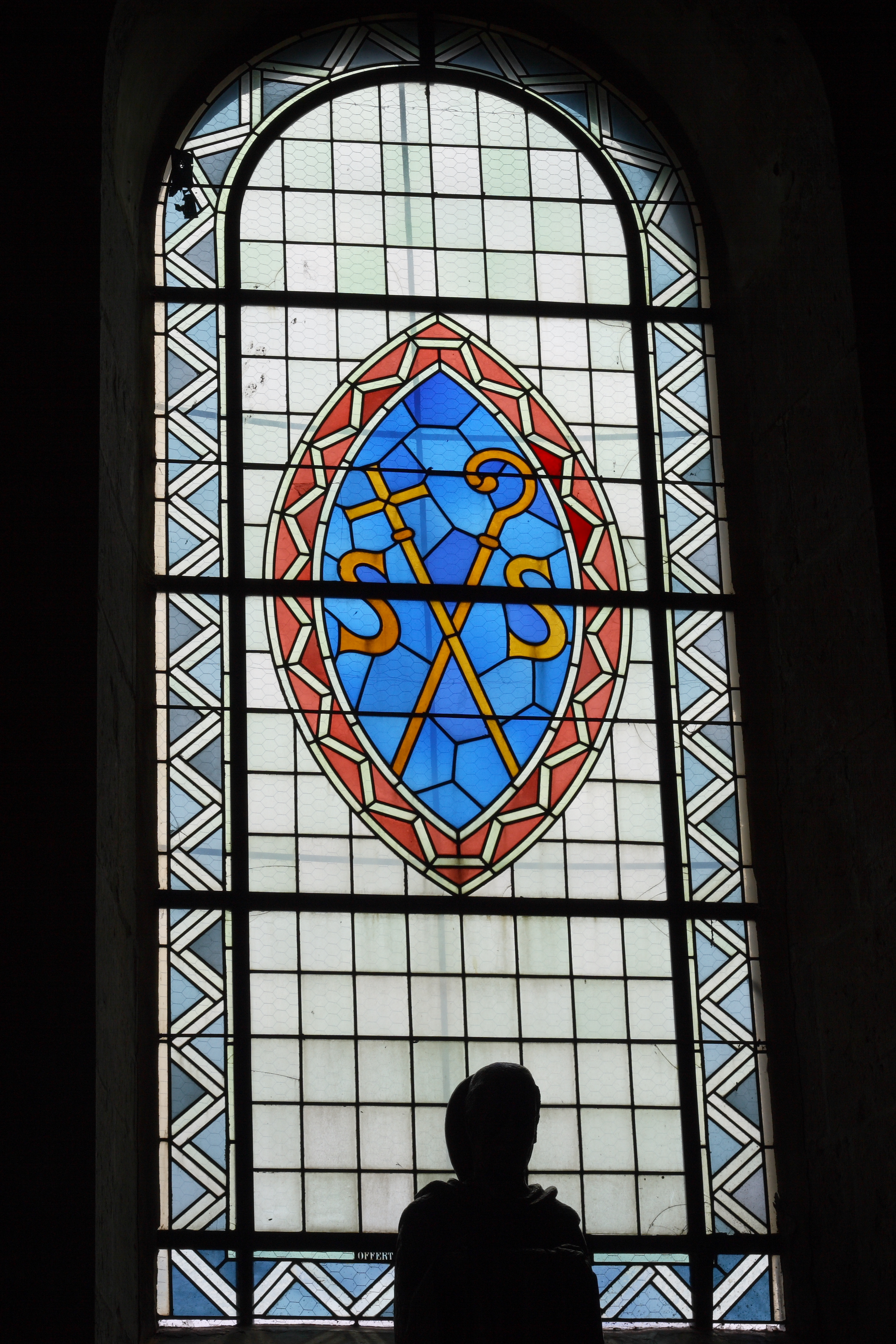 Katholische Kirche Notre-Dame de l'Assomption in Château-Landon, einer Gemeinde im Département Seine-et-Marne (Île-de-France), Fenster mit Initialen des hl. Severin